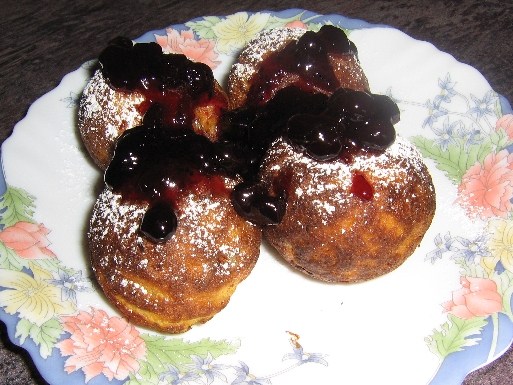 Minu esimesed Æbleskiverid